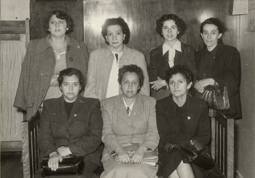 Surgimiento del Partido Femenino de Chile.